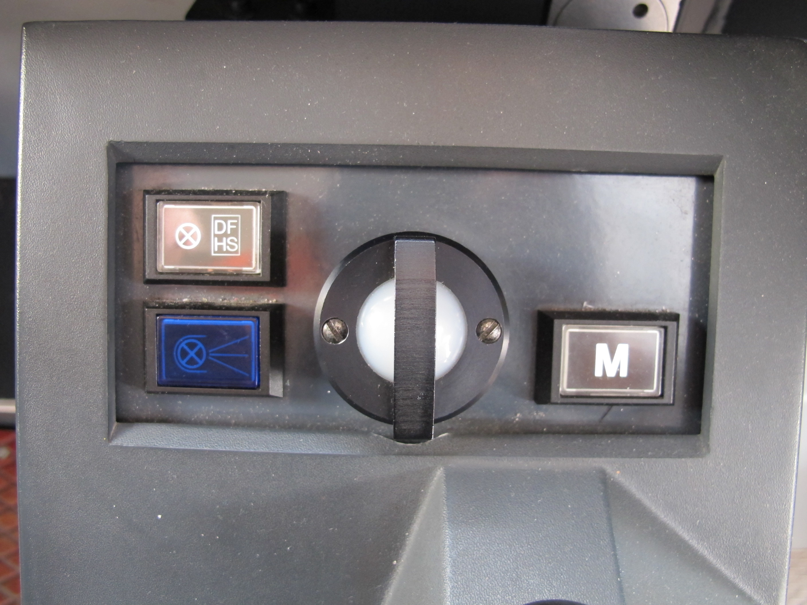 Bedienelemente für Integra-Signum Zugsicherungssystem auf einer E-Lok BLS 465